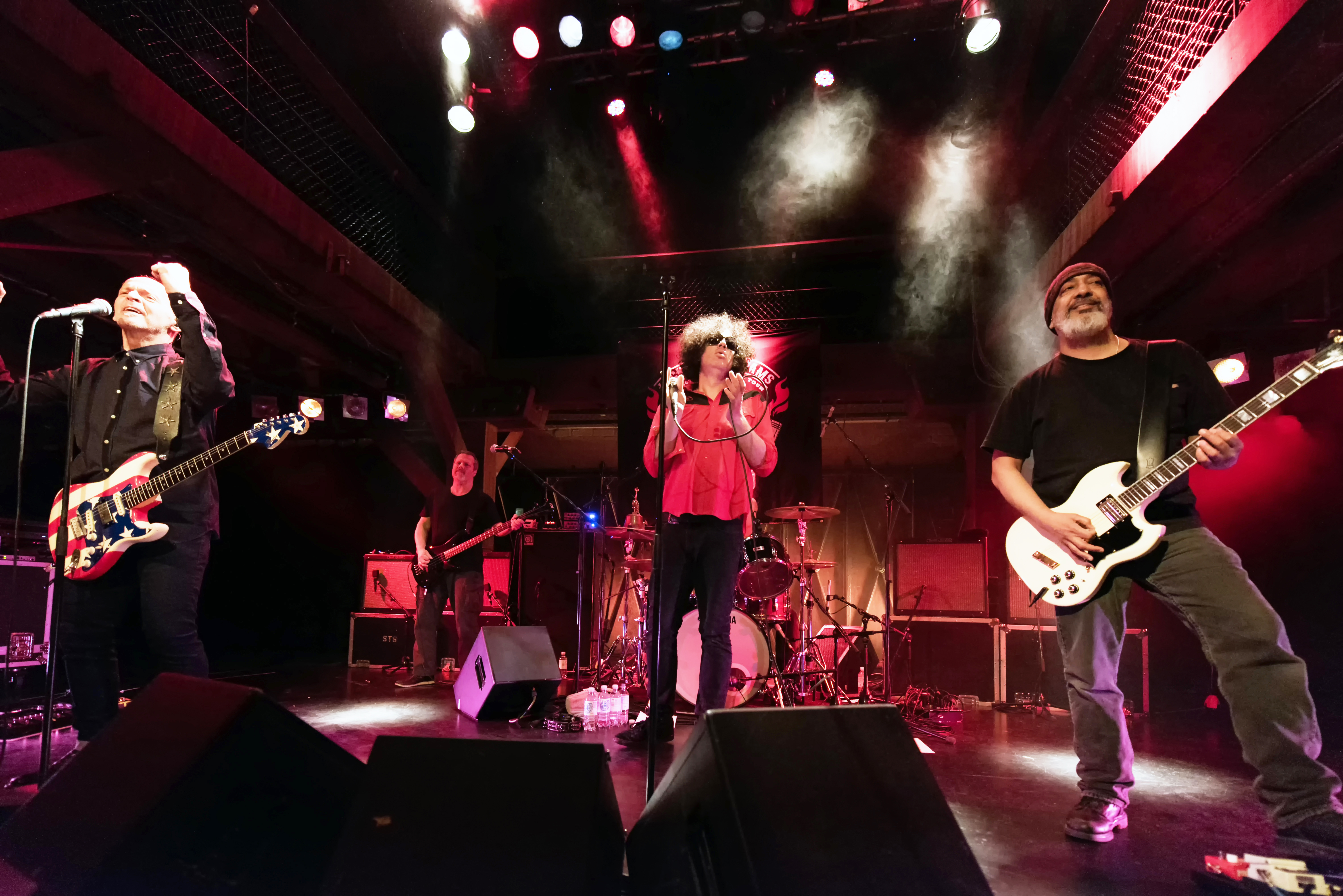 MC50 live in der Fabrik Hamburg 2018